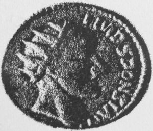 Münzbild des Sponsianus. Avers: IMP SPONSIANI, Kopf rechts mit Strahlenkrone. (Revers des Minucius Augurinus; Säule zwischen zwei Männern; nicht im Bild)